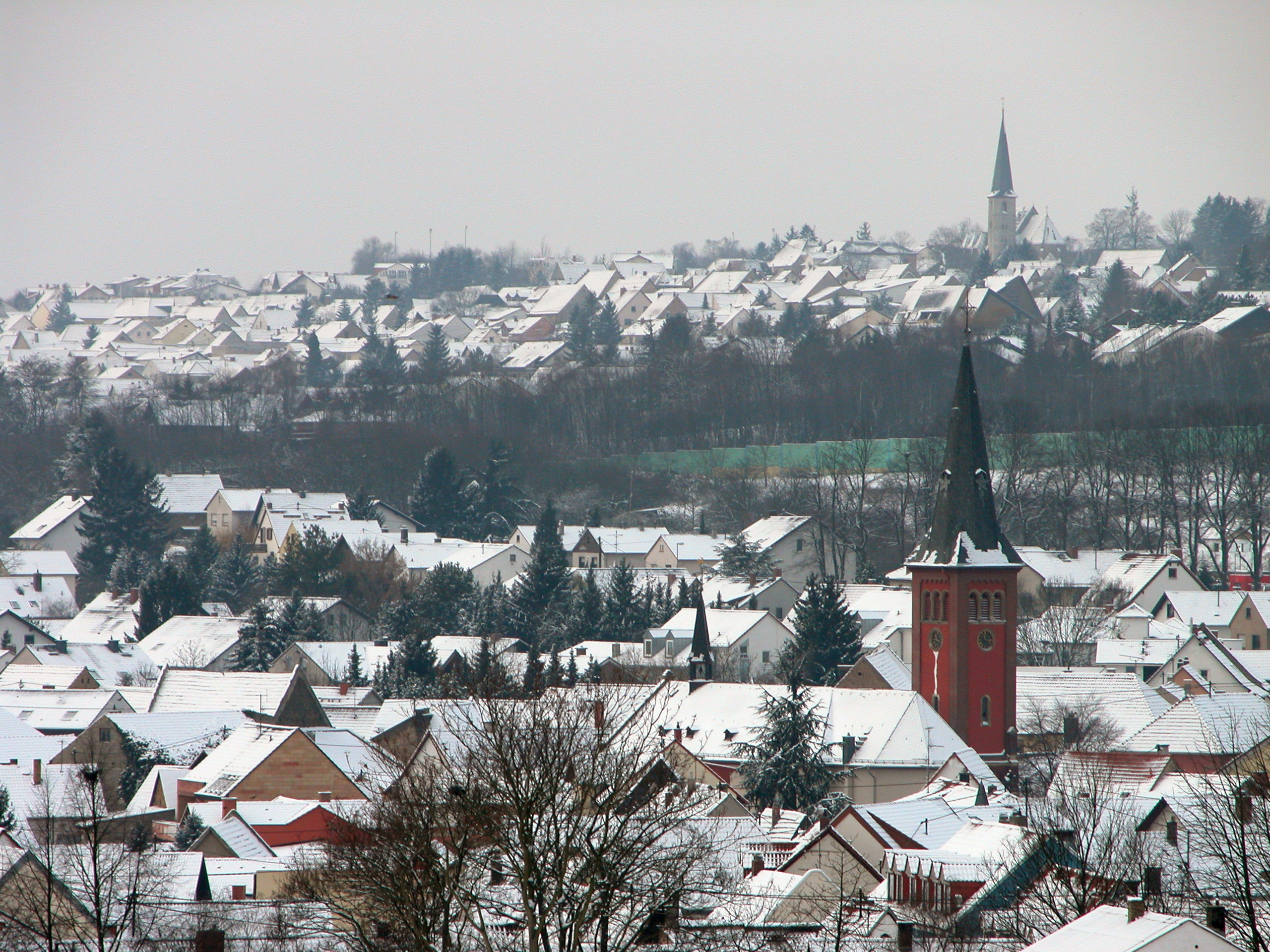 Klein-Winternheim